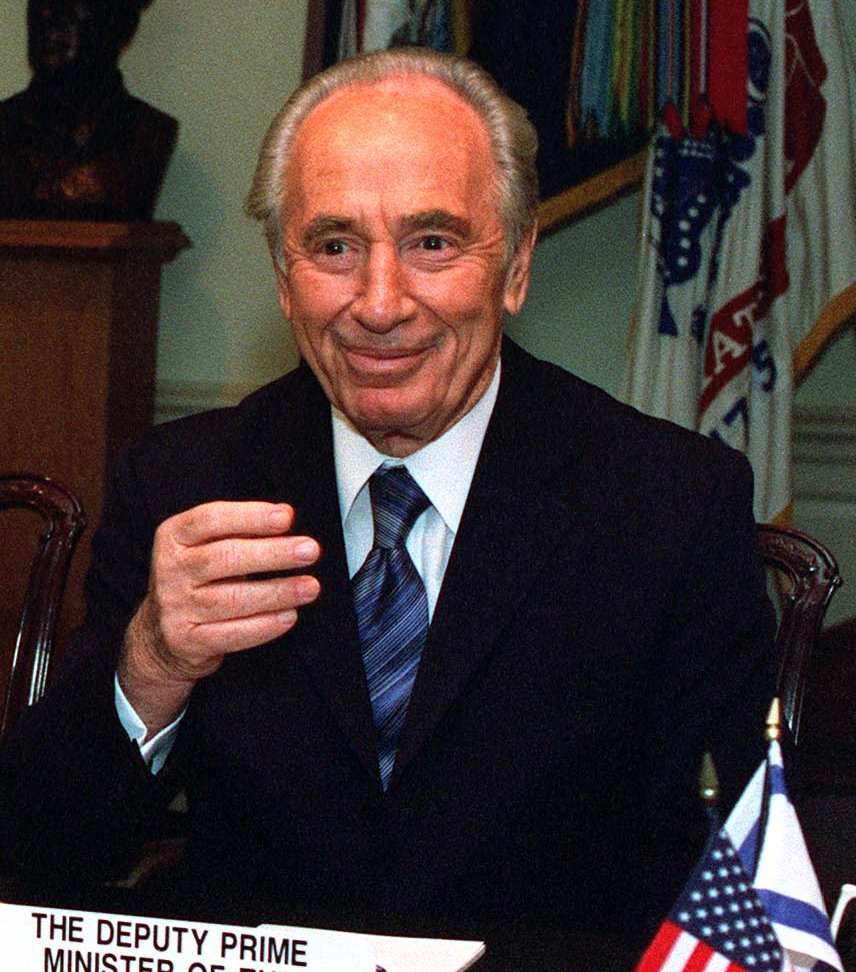 Shimon Peres, Israeli statesman